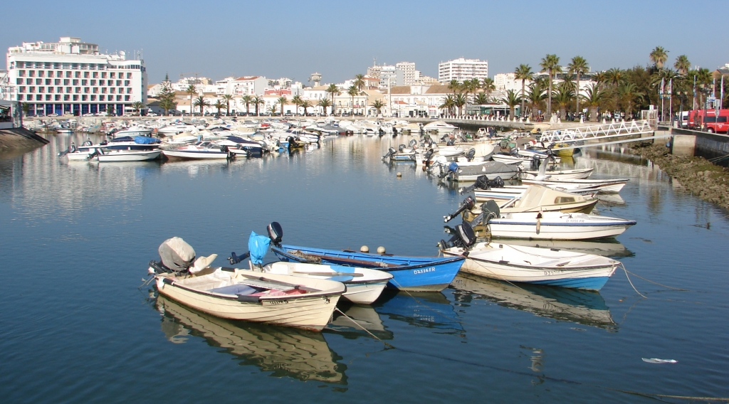 Faro © Valter Jacinto